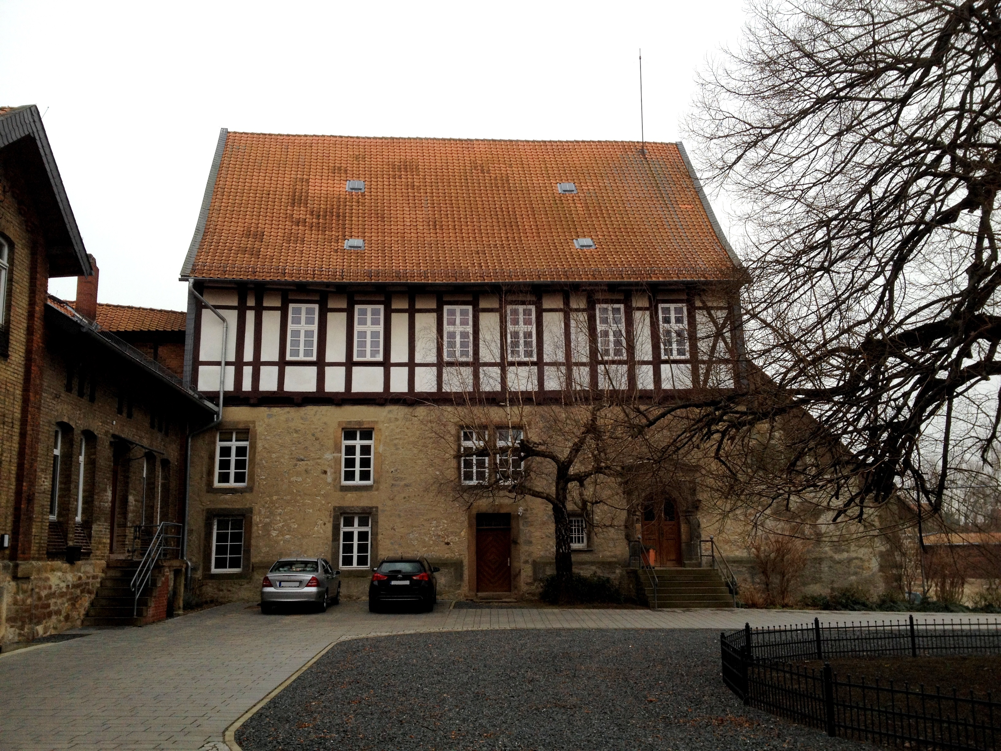 Domäne Schladen